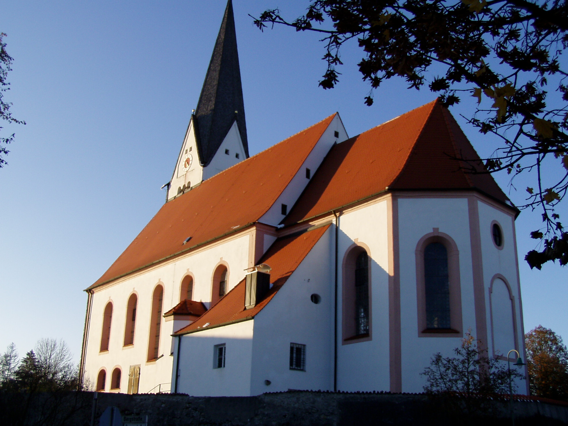 Pfarrkirche St. Stephan in Burggen